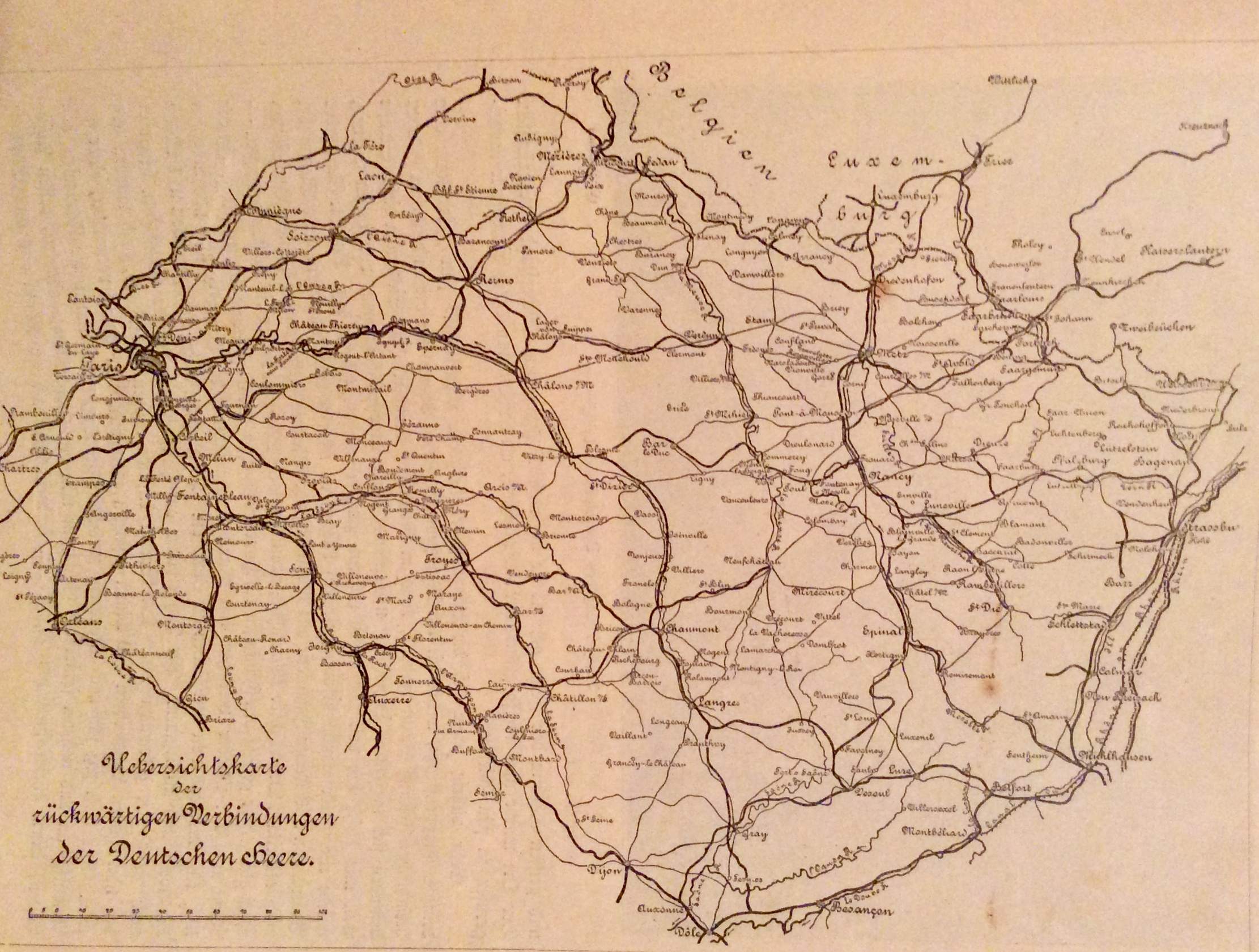 Carte représentant les villes-étapes de repli des Prussiens en 1870-71